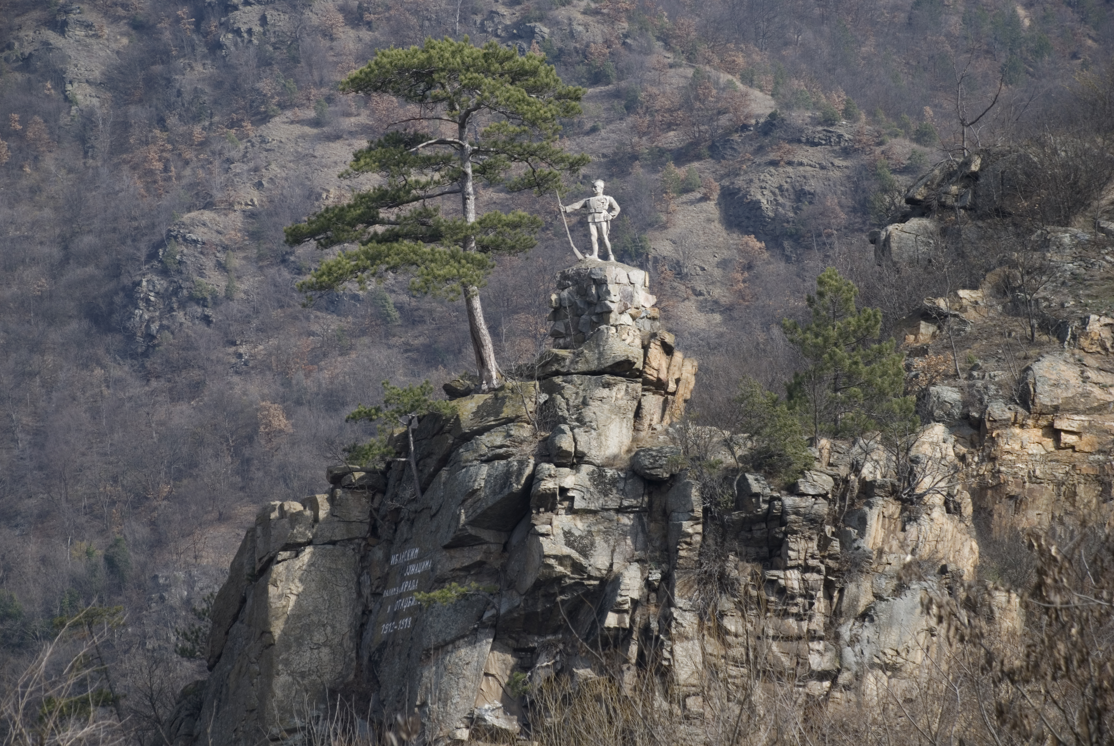 izgled